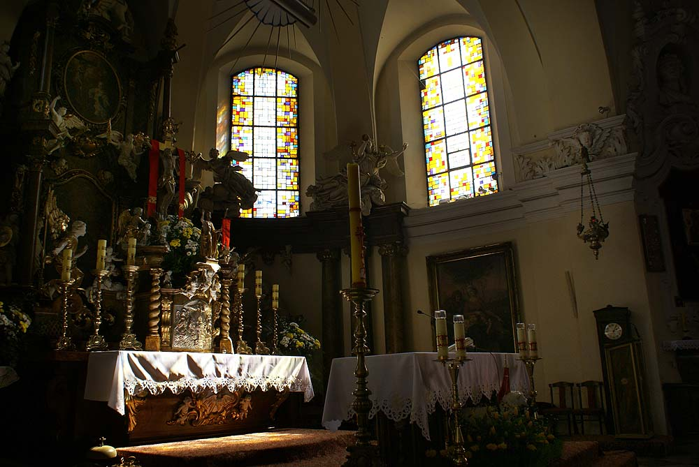 Kościół św. Maurycego Traugutta 36, Miasto Wrocław - Krzyki